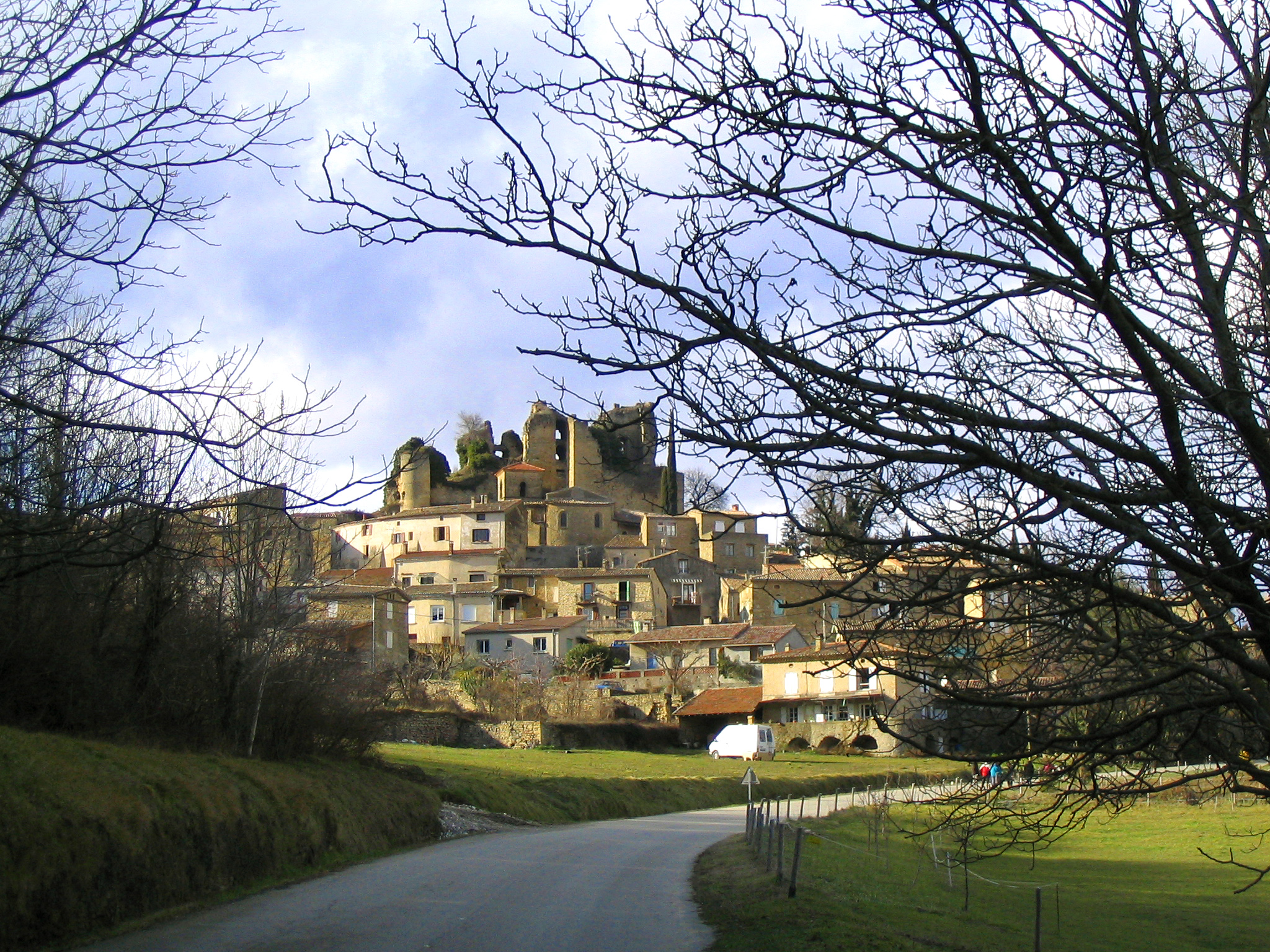 Chabrillan